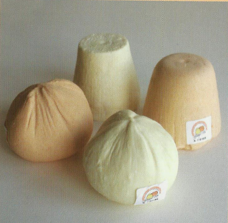 Variedaes d'afuega'l pitu